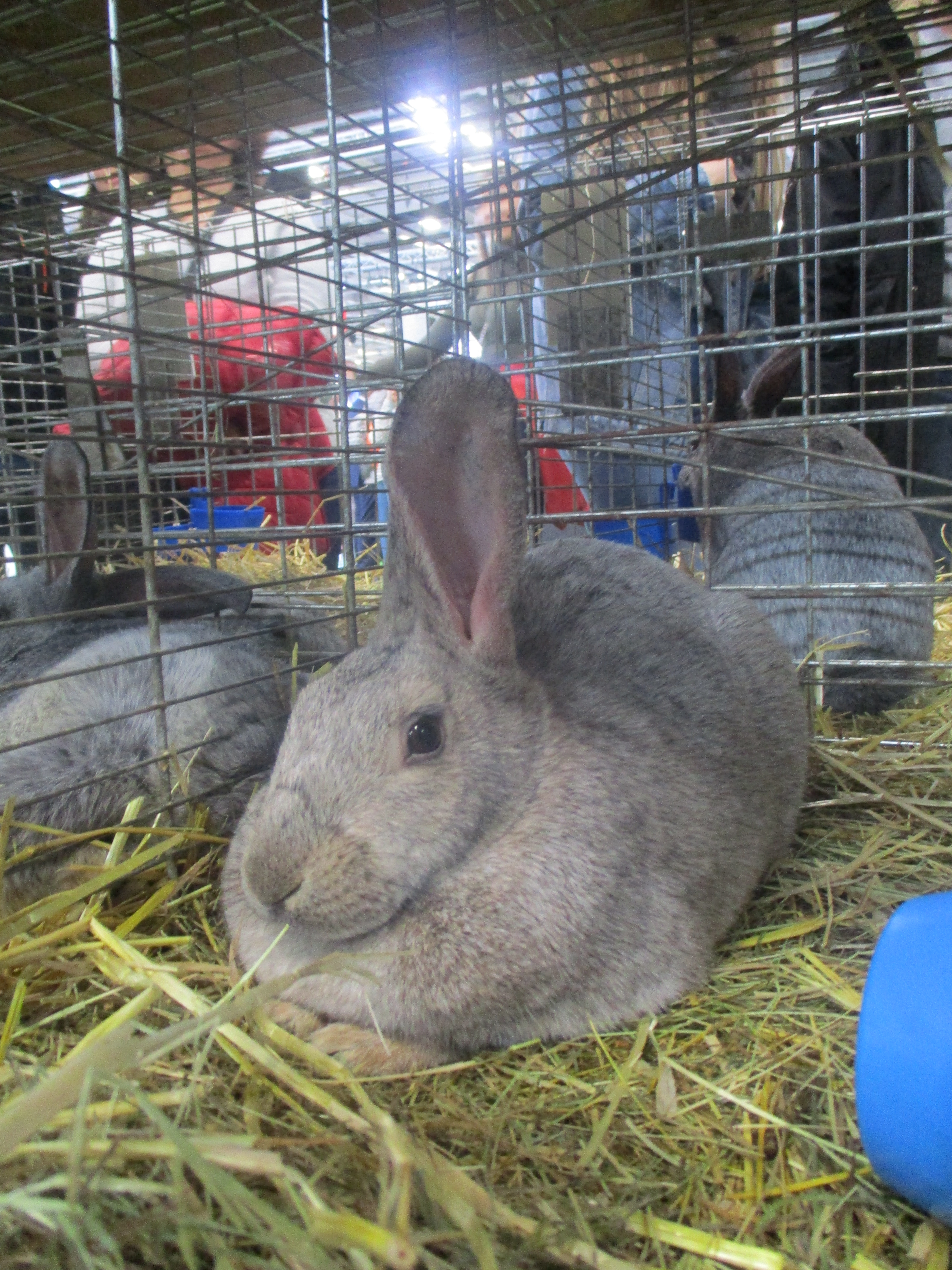 Lapine argentée de Saint-Hubert au SIA 2020.